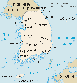 Мапа Південної Кореї